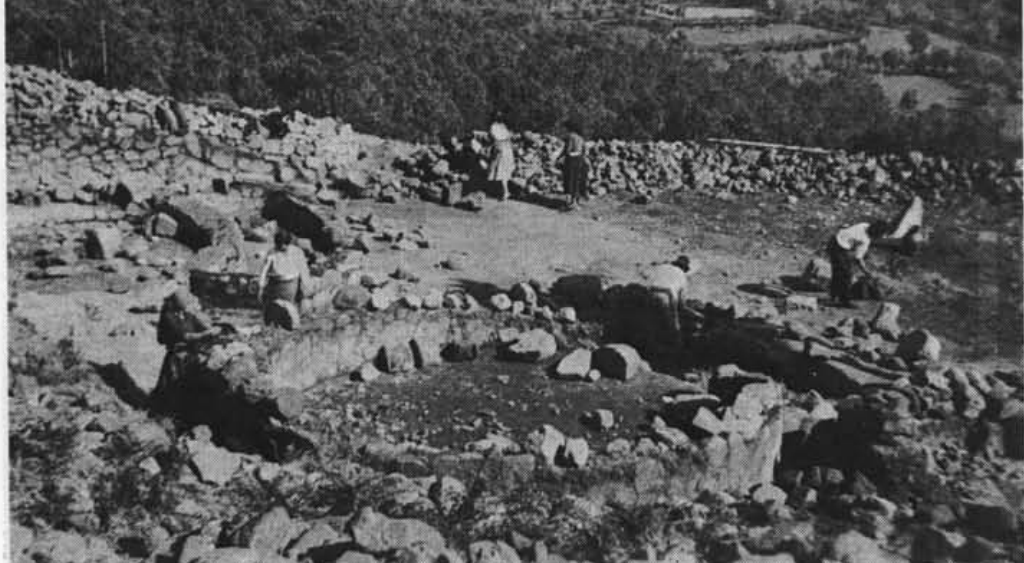 Escavações citânia São Julião